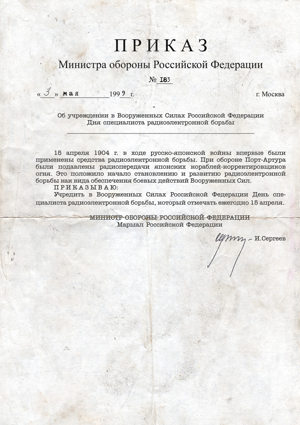 Приказ Министра обороны Российской Федерации №183 от 3 мая 1999 года